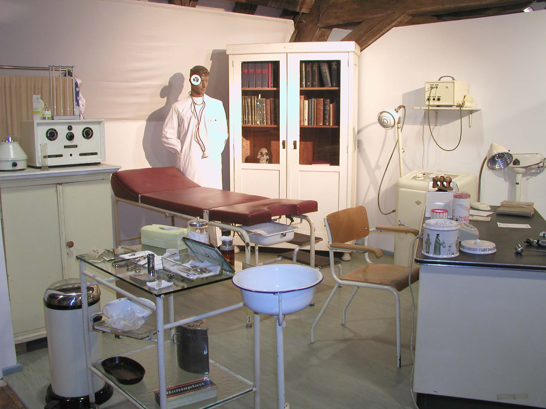 Arztpraxis 1950er Maihingen